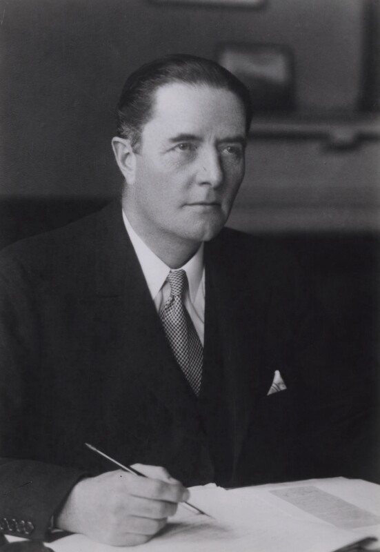 Lord Hudson